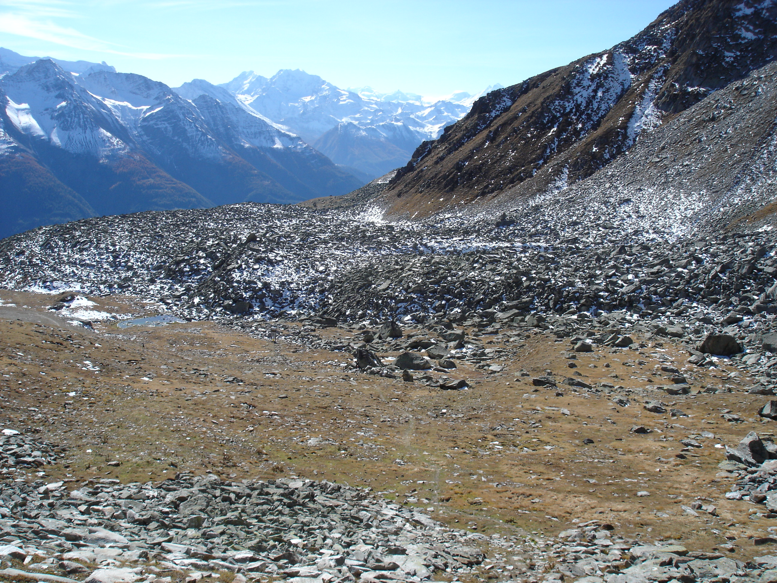 Blockgletscher am Bettmerhorn im Wallis